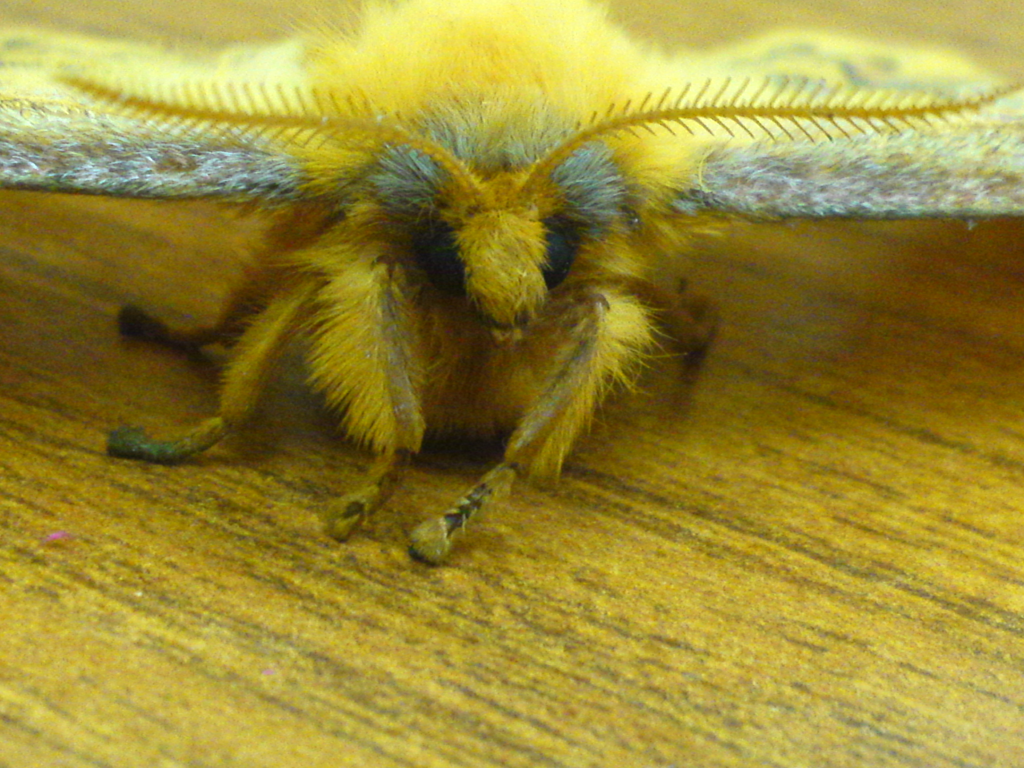 ウスタビガ♀メス 顔